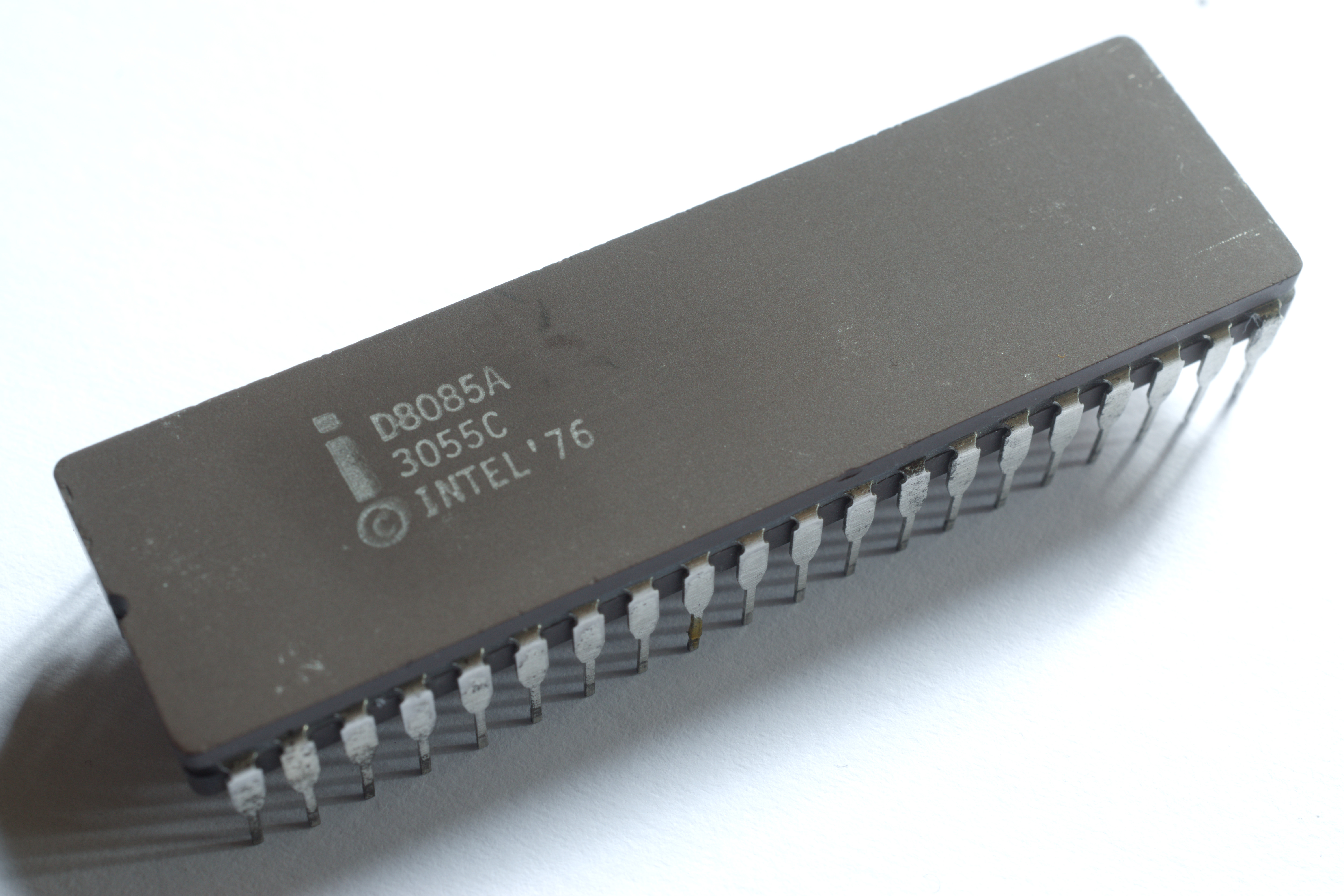 Procesoro Intel D8085A.